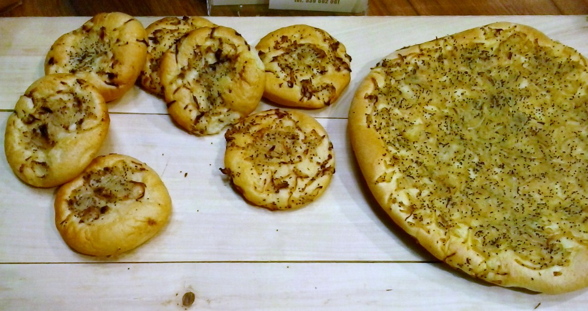 Cebularz z Lublina.